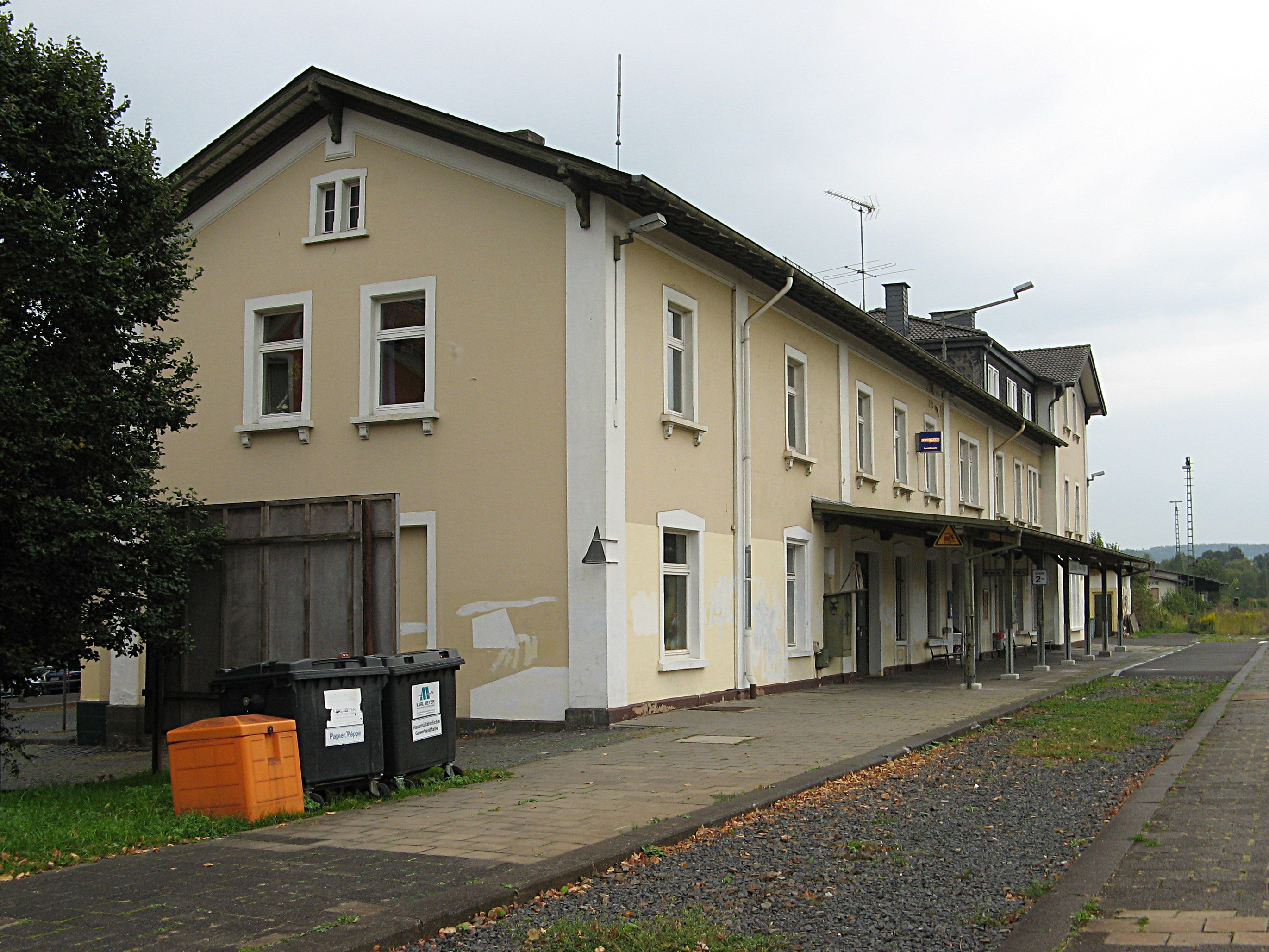 Dieses Foto entstand im Rahmen des Projekts Wiki Loves Monuments Mittelhessen, das aus dem Community-Projektbudget von Wikimedia Deutschland e. V. gefördert wurde.